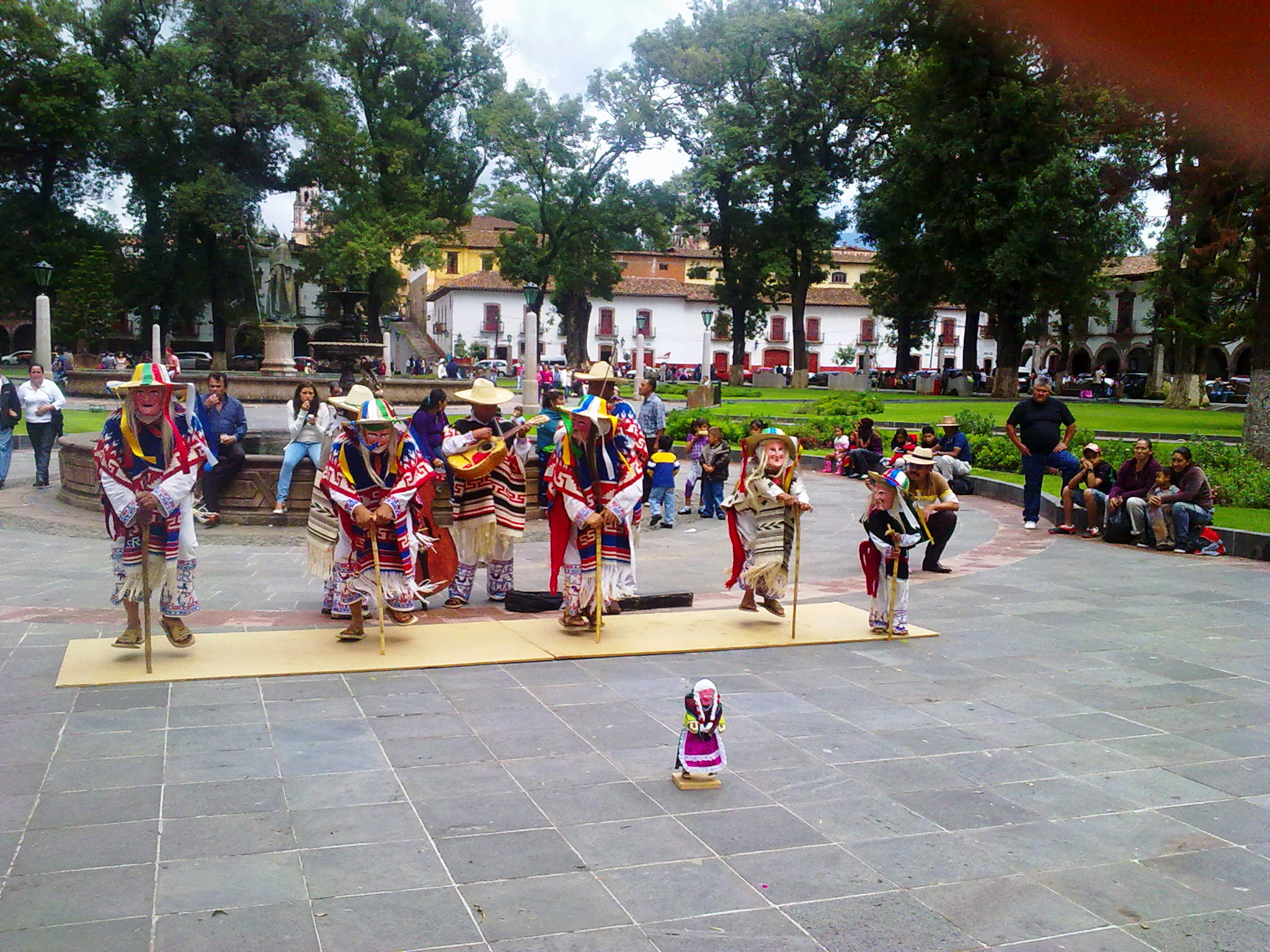 Danza típica de Patzcuaro, Michoacán